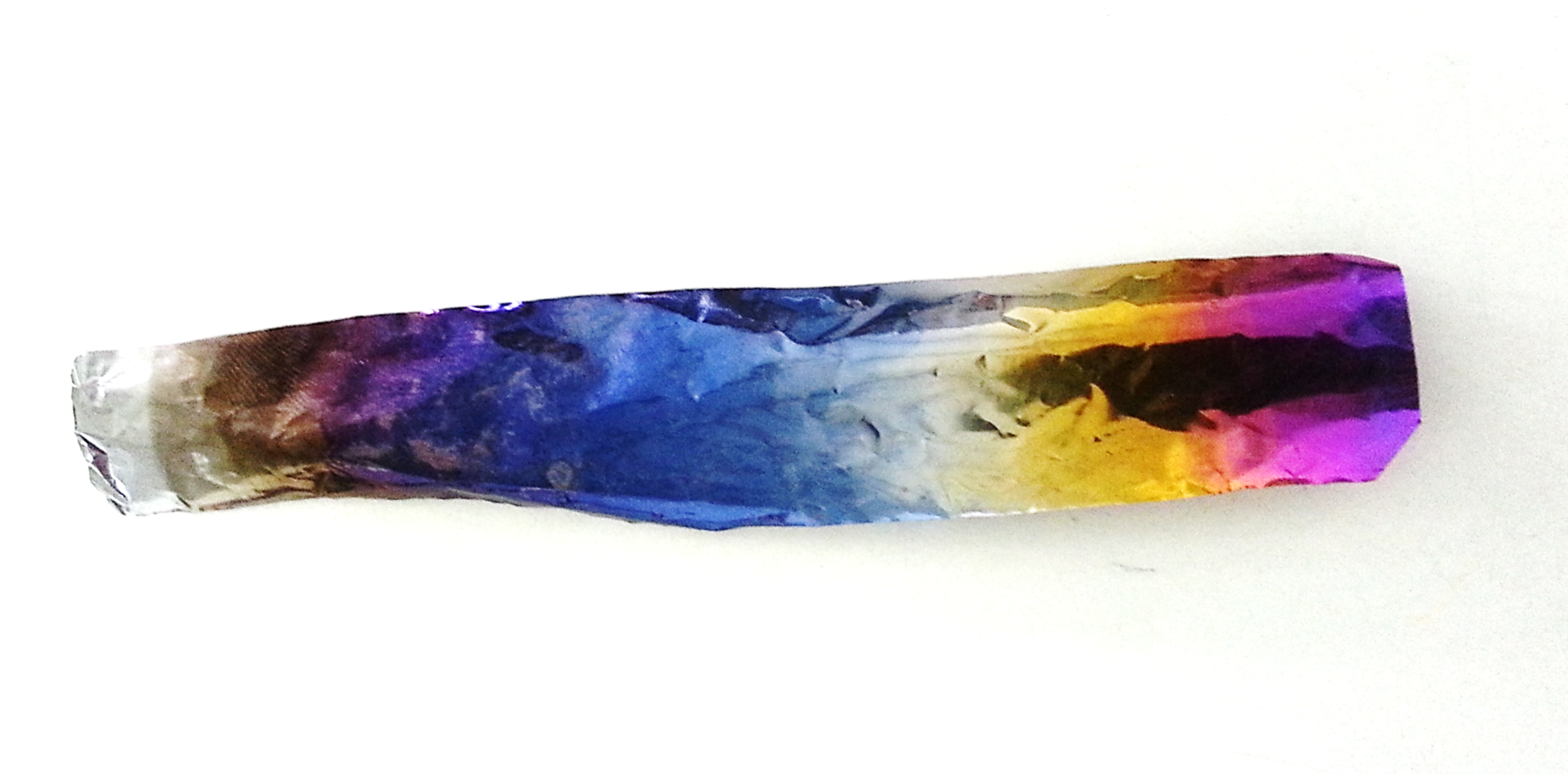 רדיד טנטלום שעבר אילגון. התוצאה - יצירה של שכבות פסיביצה המבוססות על תחמוצת טנטלום בעוביים משתנים. התמונה באדיבות ד"ר יוסי גופר, אוניברסיטת בר אילן. Tantalum